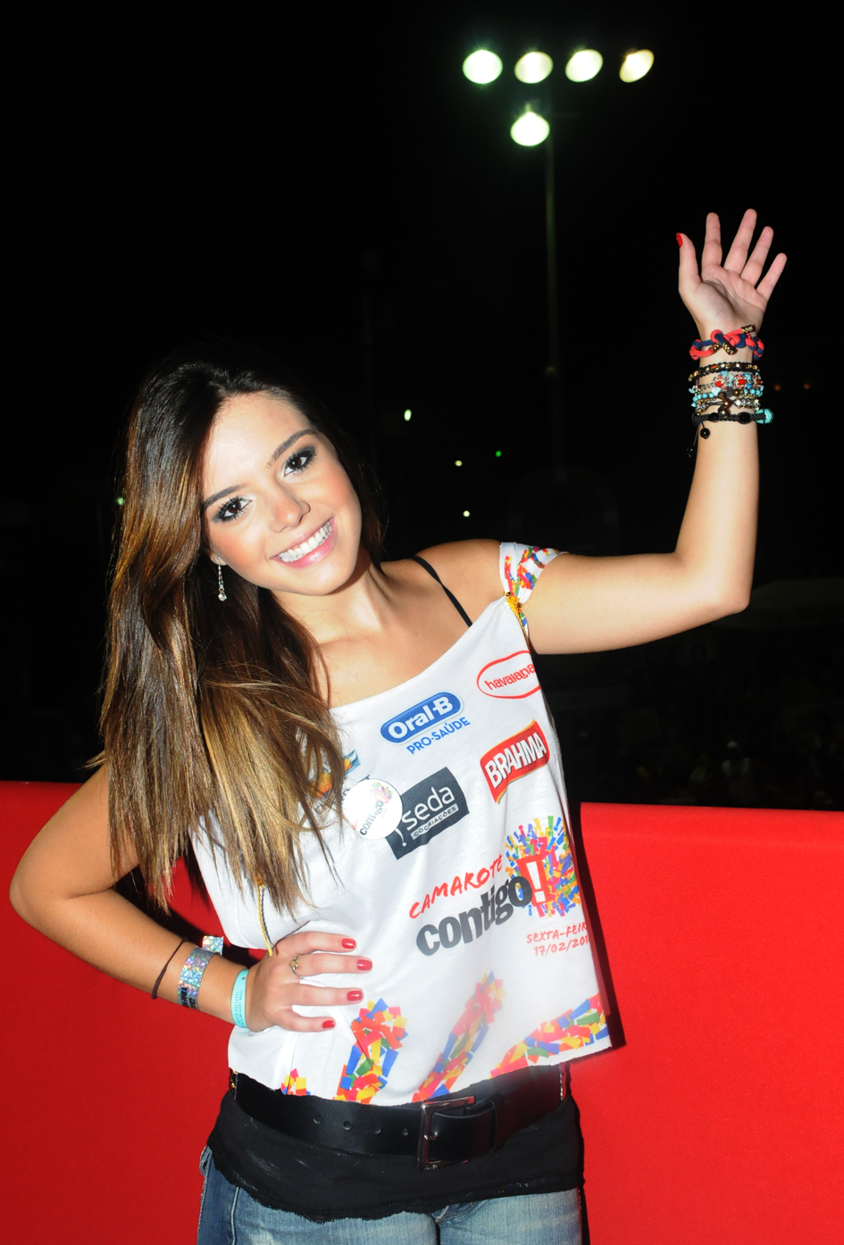 Giovanna Lancellotti